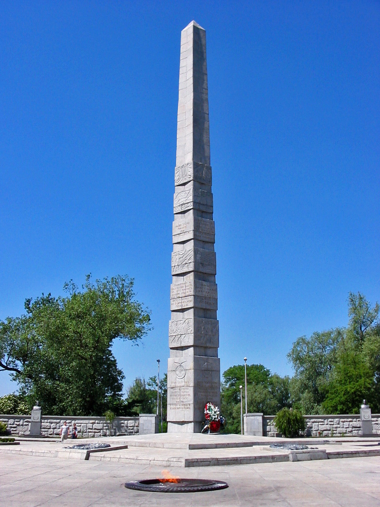 Památník v Kaliningradu, Rusko